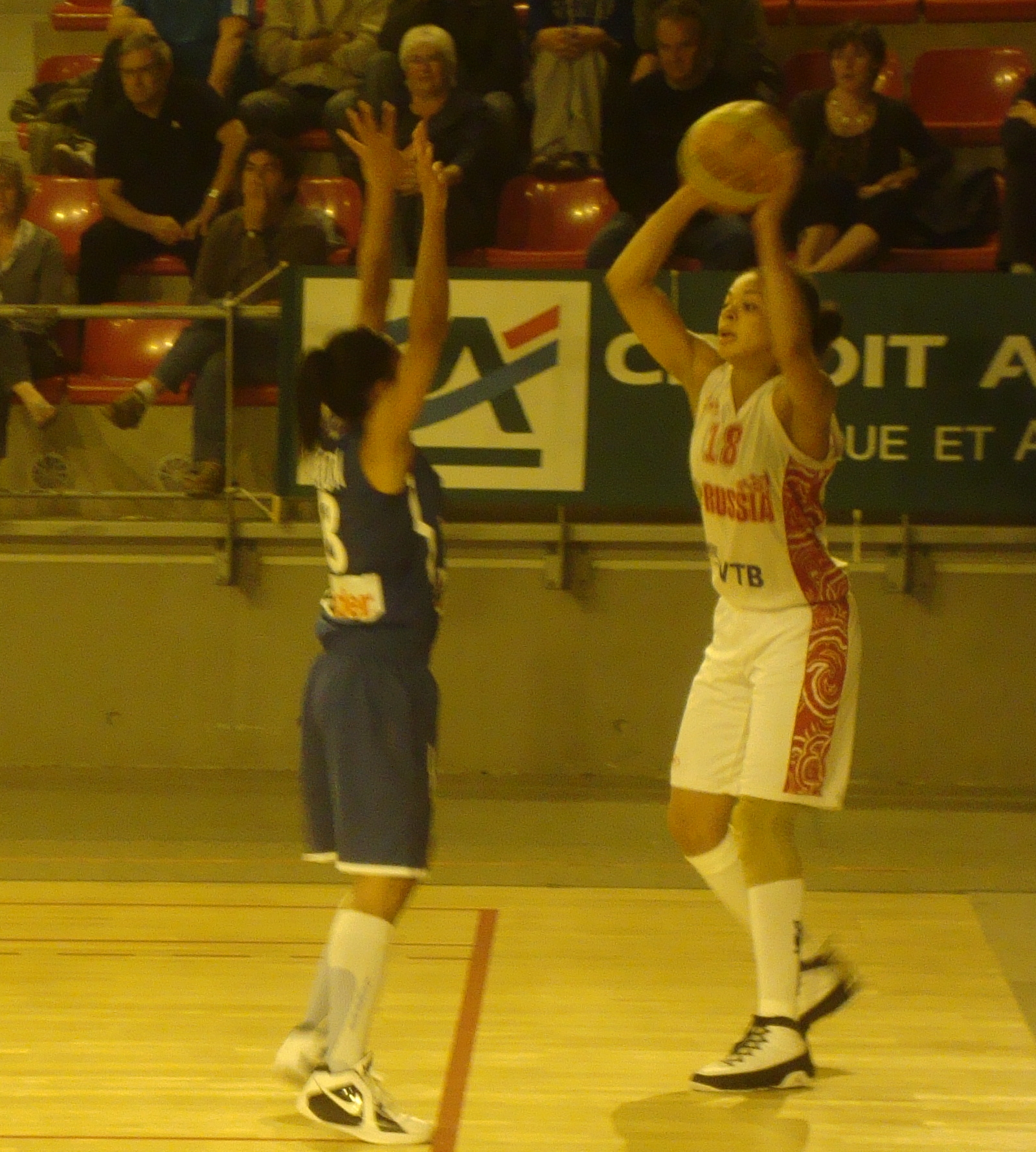 La basketteuse russe Katerina Keyru (balle en main) face à Edwige Lawson-Wade